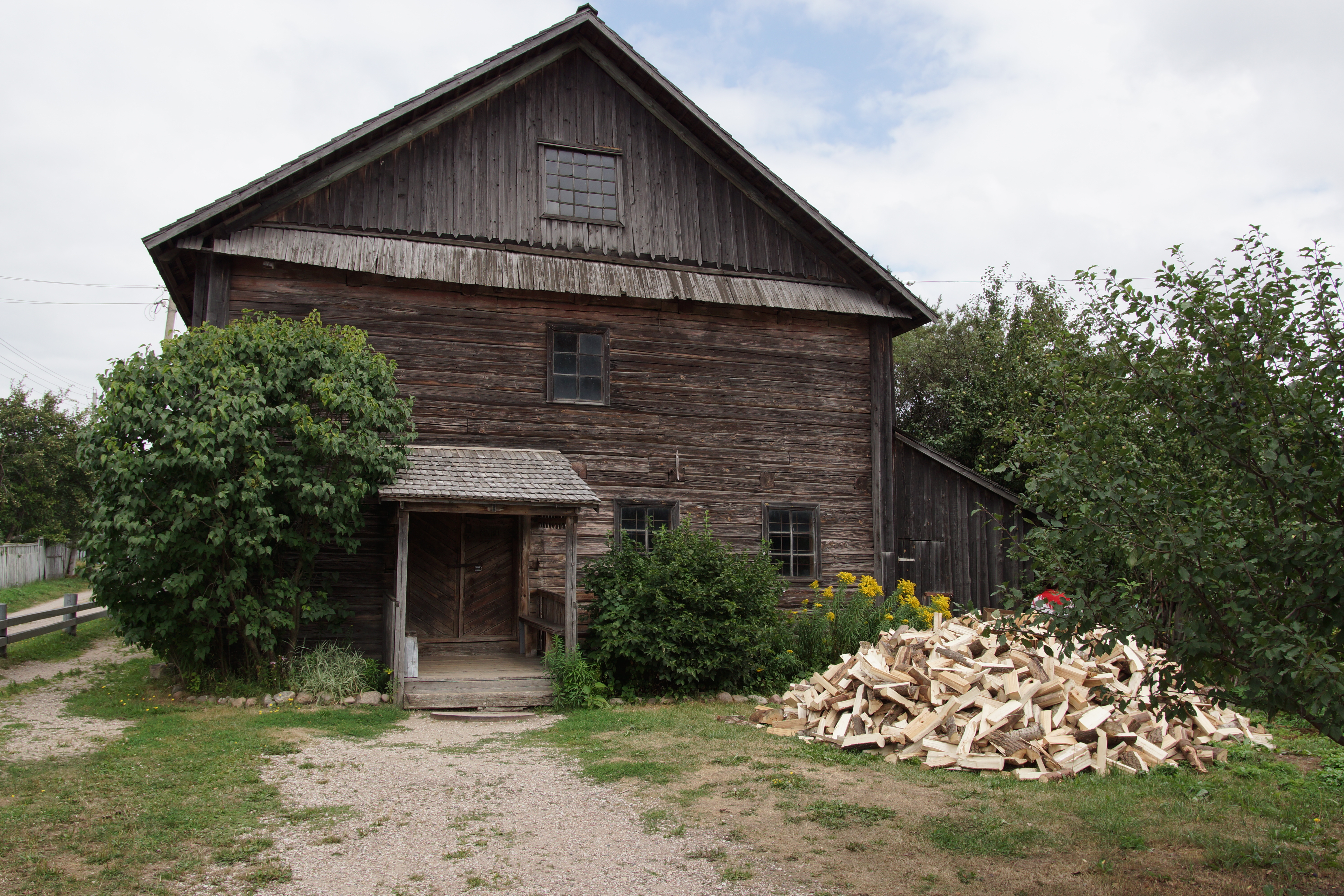 Беларуская (тарашкевіца): Музэефікаваныя аб’екты этнаграфічных комплексаў «Млын» і «Кузьня»:паравы млын дом завозьнікаў сьвіранкузьня. г. Заслаўе This is a photo of Belarusian heritage monument. Reference number: 612Г000334 ( WLM)